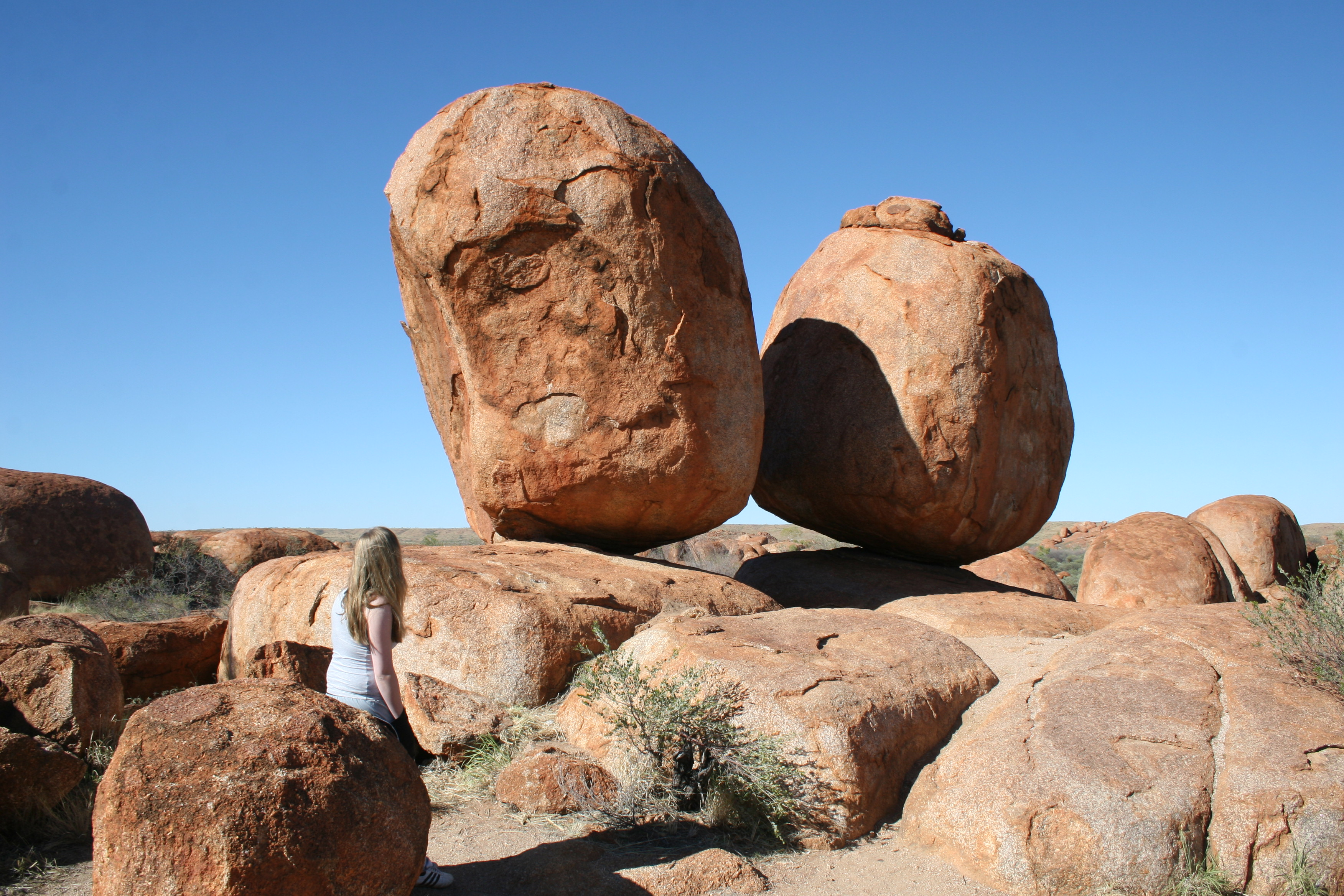 Devils Marbles in Australien